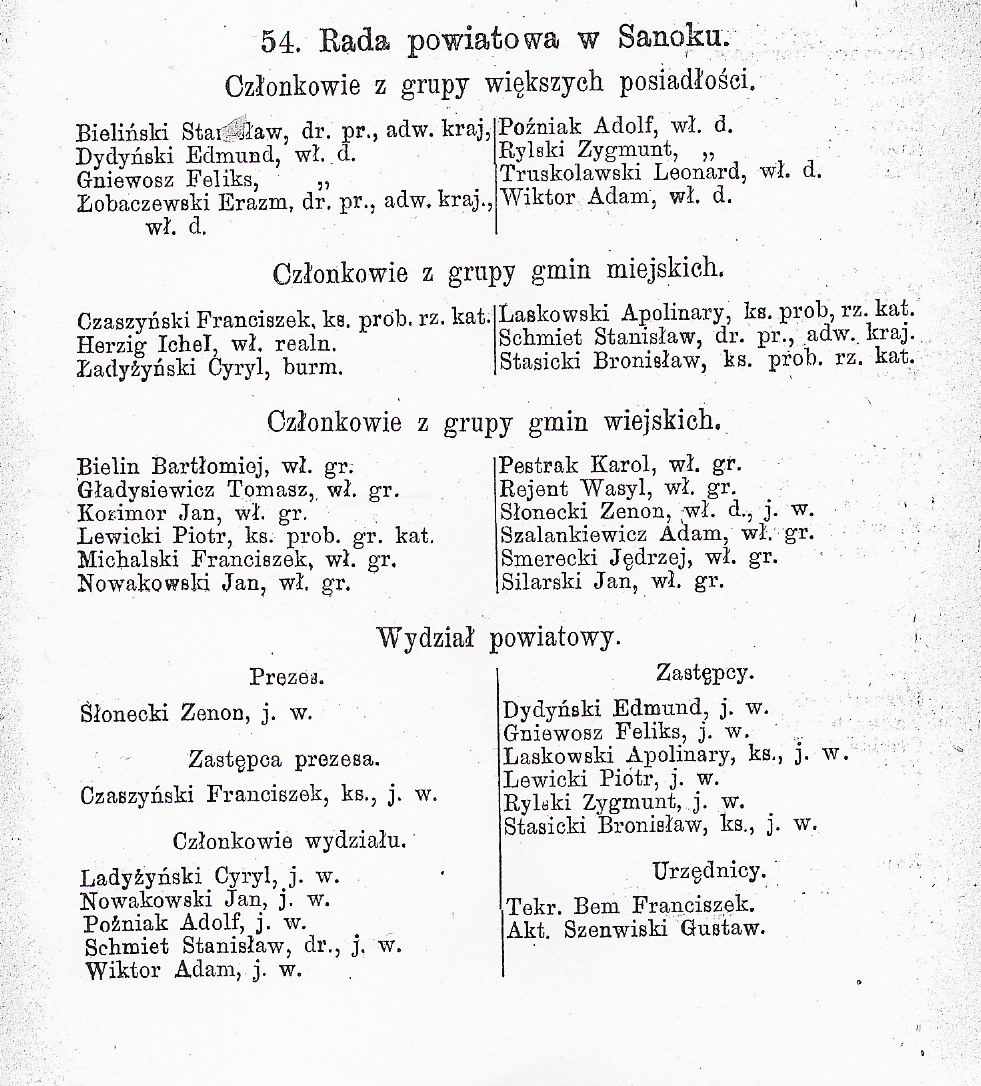 skład rady powiatu sanockiego z roku 1880